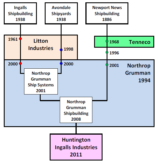 История слияний компаний, ныне являющихся подразделениями Huntington Ingalls Industries